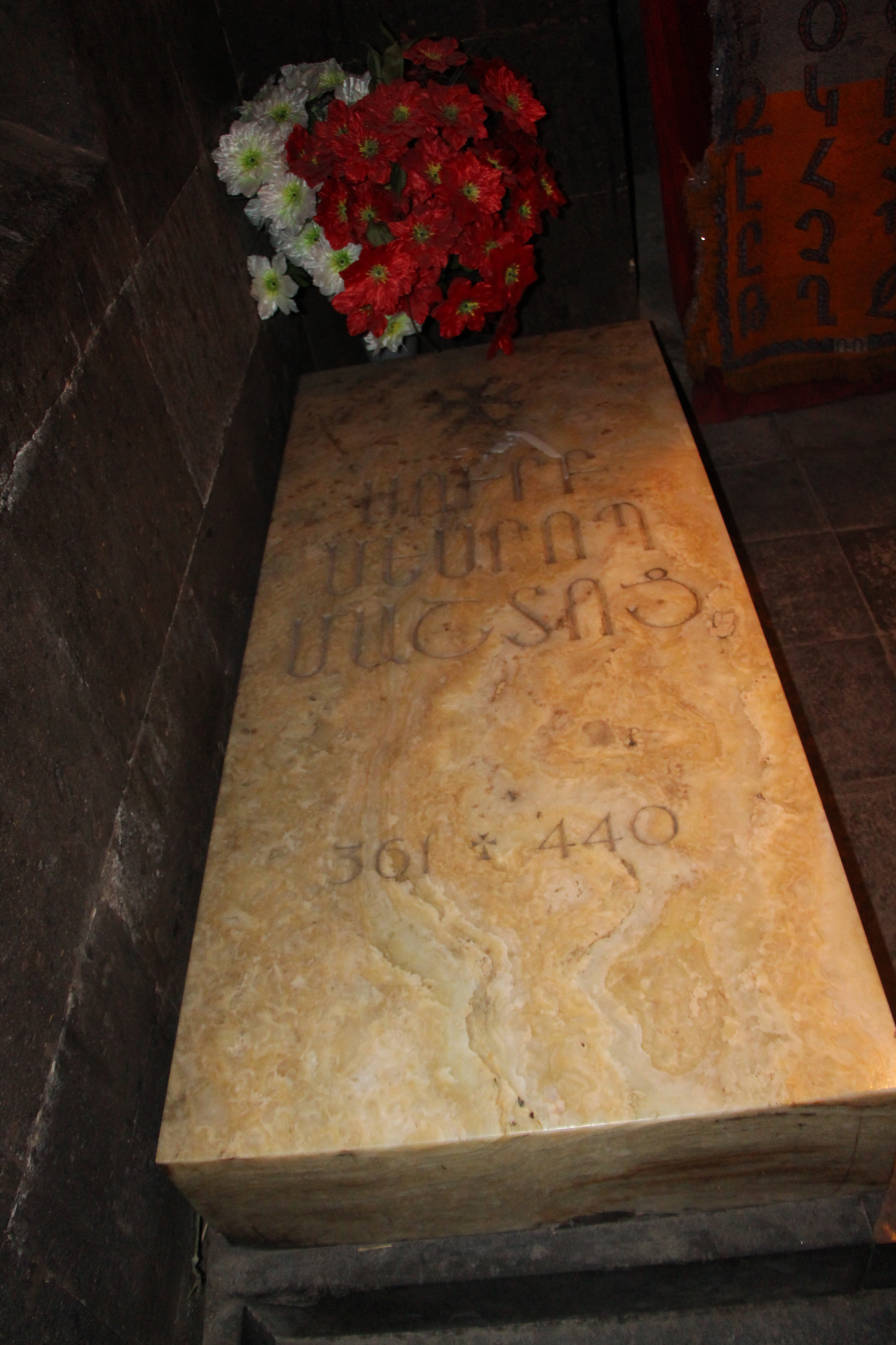 Օշական, Արագածոտնի մարզ, դամբարան Մեսրոպ Մաշտոցի 442-443 թթ. 2.113/22.2 պատվիրատու՝ Վահան Ամատունի 113/22.2